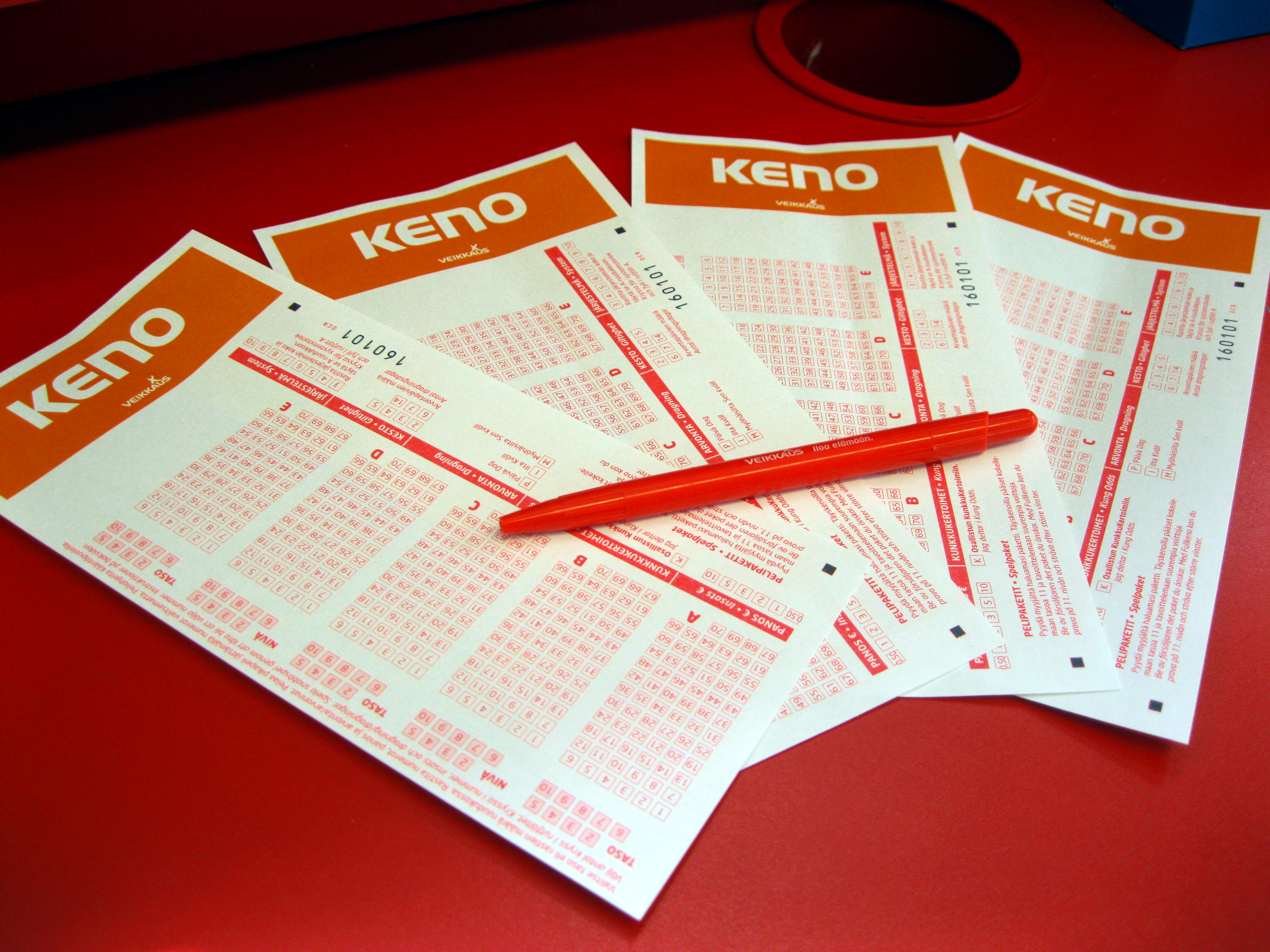 Veikkauksen Kenon pelikuponkeja.